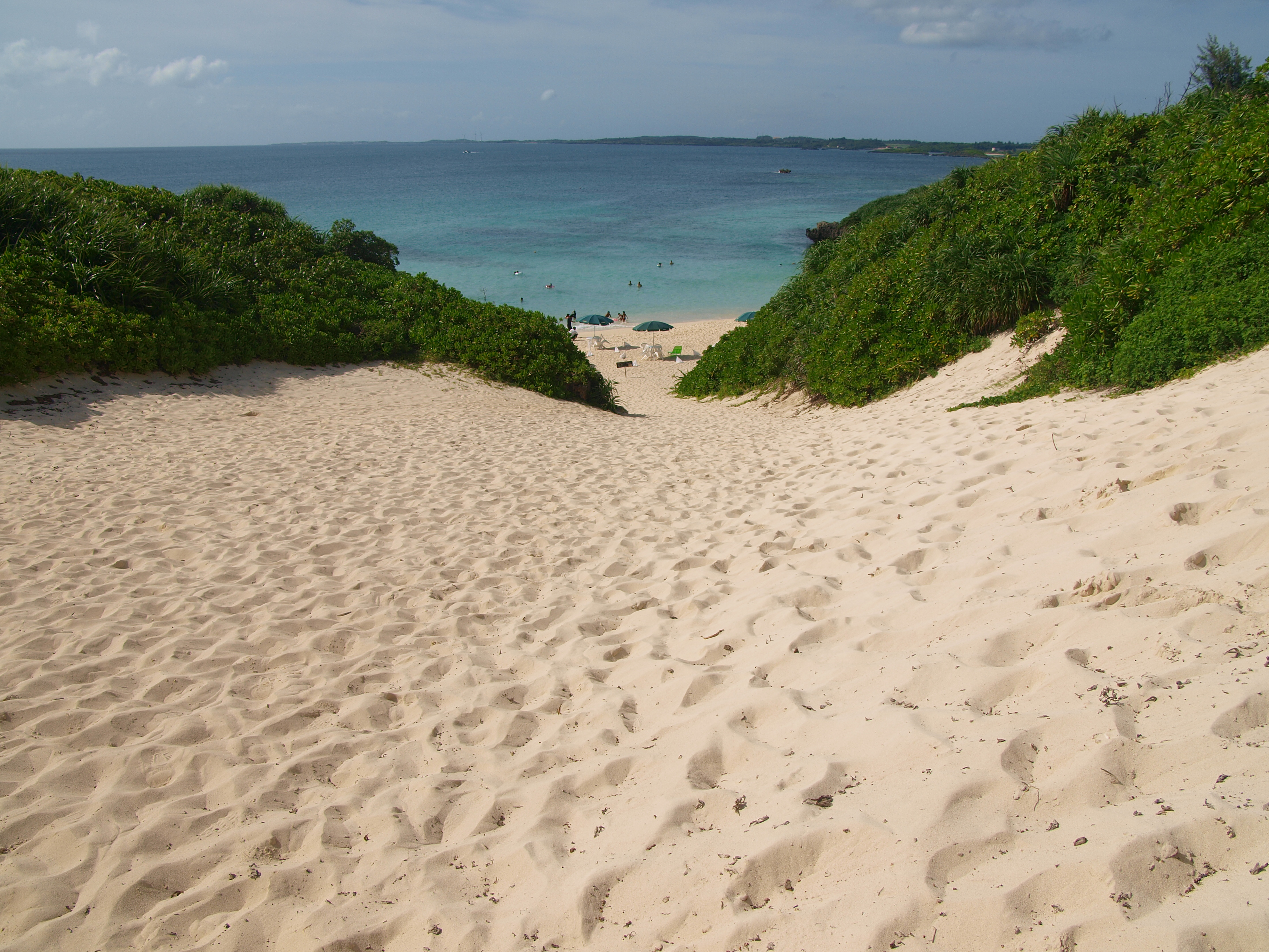 砂山ビーチ（沖縄県宮古島市宮古島）